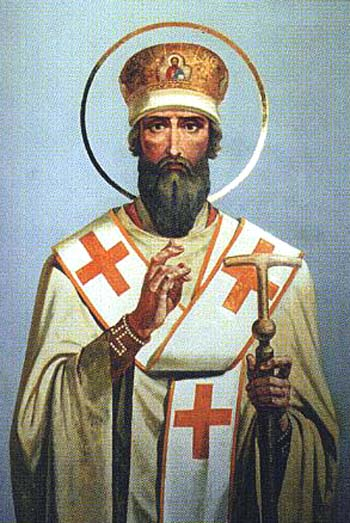 San Flaviano patriarca di Costantinopoli e martire in abiti di tradizione bizantina